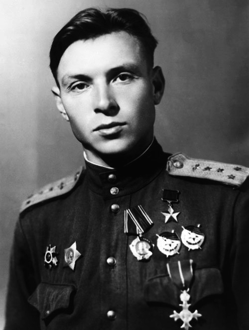 Дважды Герой Советского Союза Кирилл Алексеевич Евстигнеев